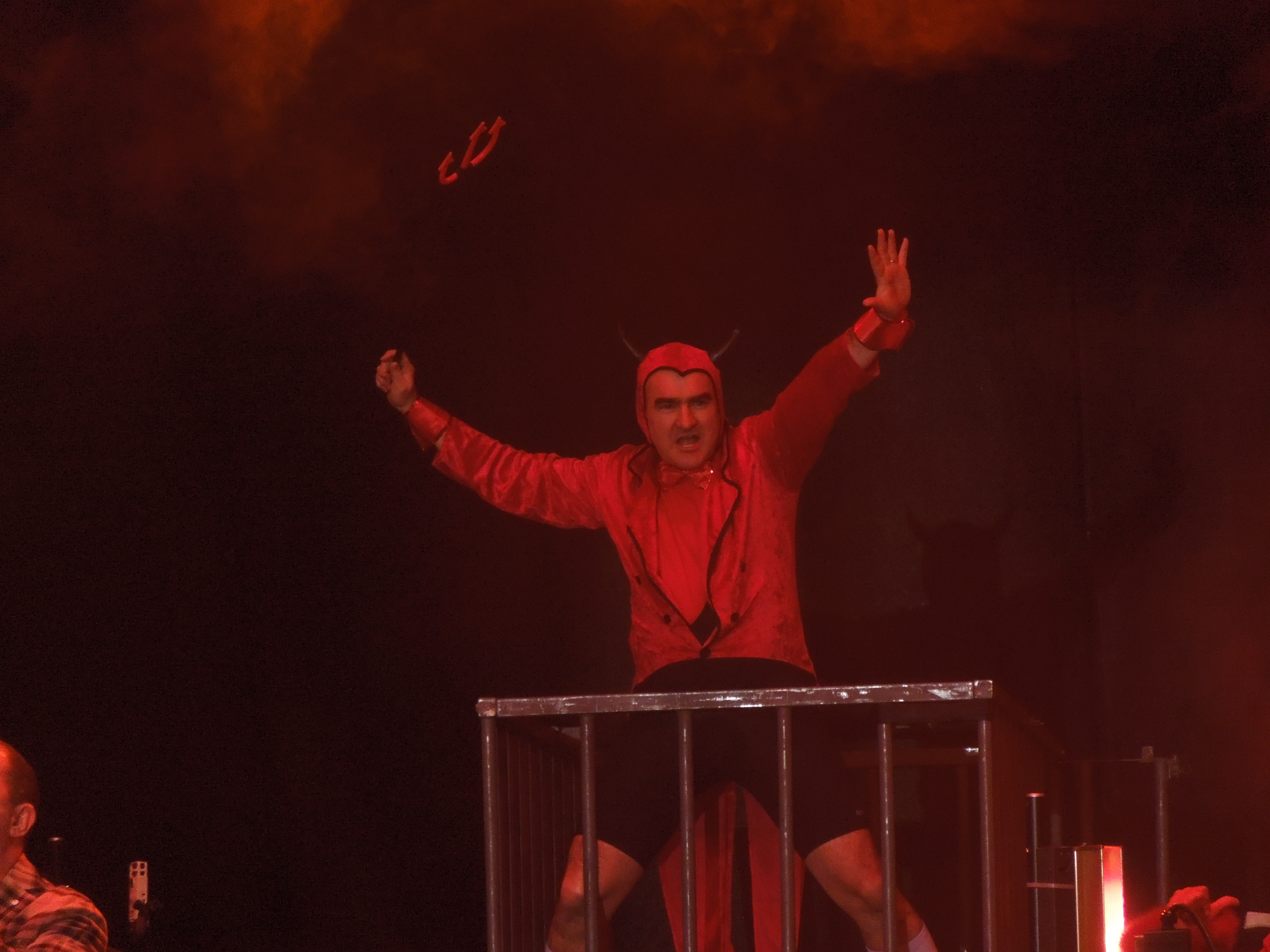 Lumbaart: 31 dicember del 2013: el Luca Mangoni in Piazza del Domm (Milan) al concert de la fin de l'Ann del grupp de Elio e le Storie Tese.